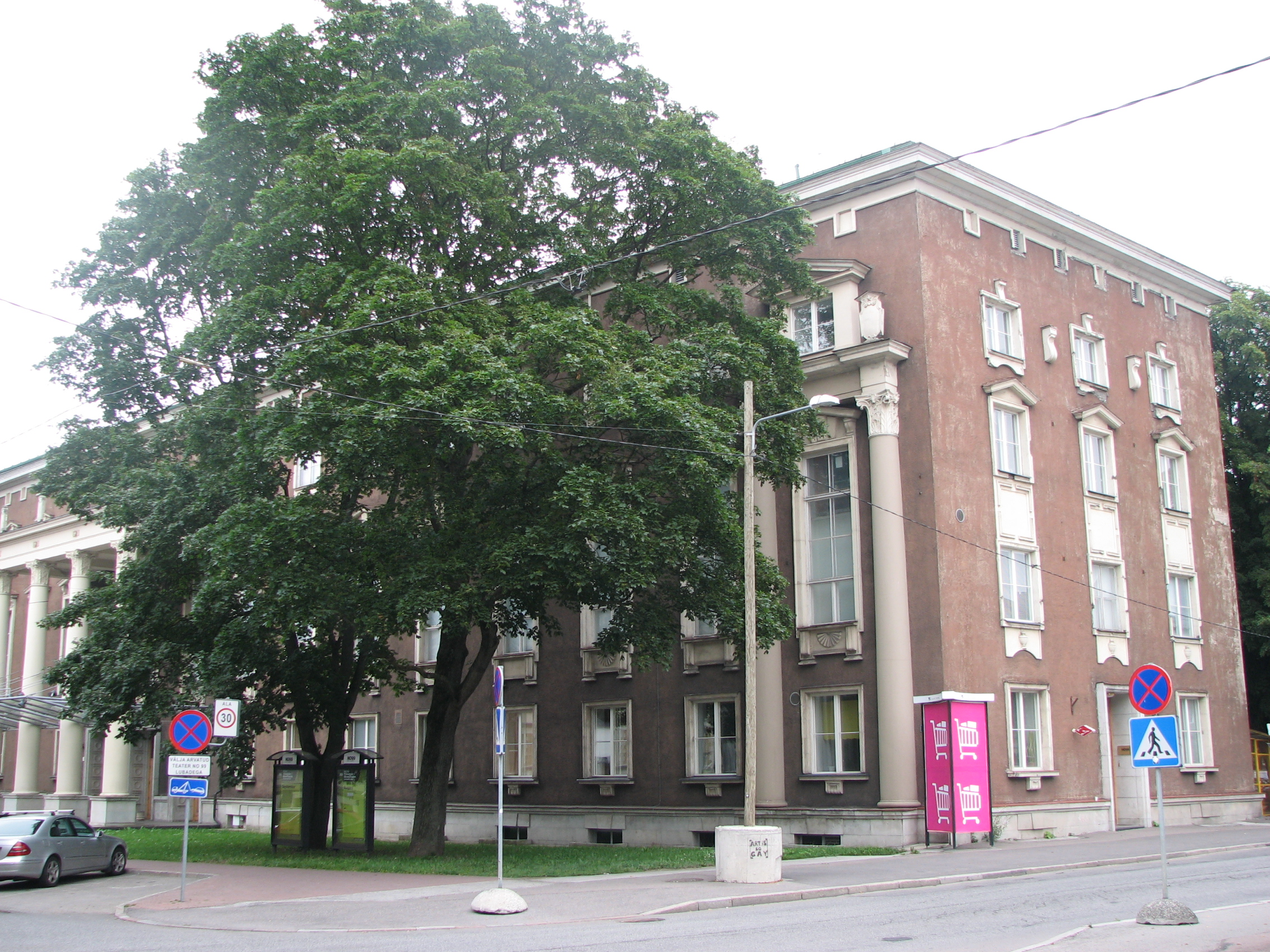 Teater NO99 hoone Sakala 3 Tallinnas ehitati aastail 1940-1947